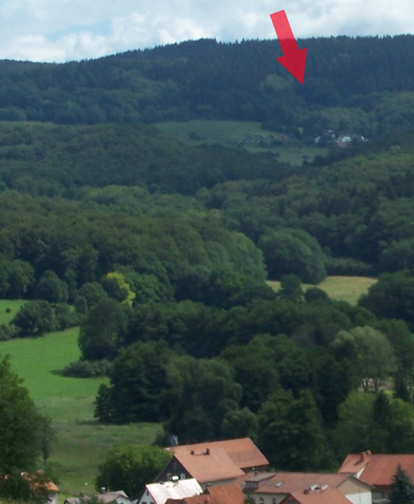 Blick von Bairoda nach Nordosten zum Altbergbaugebiet Hohe Kl inge.